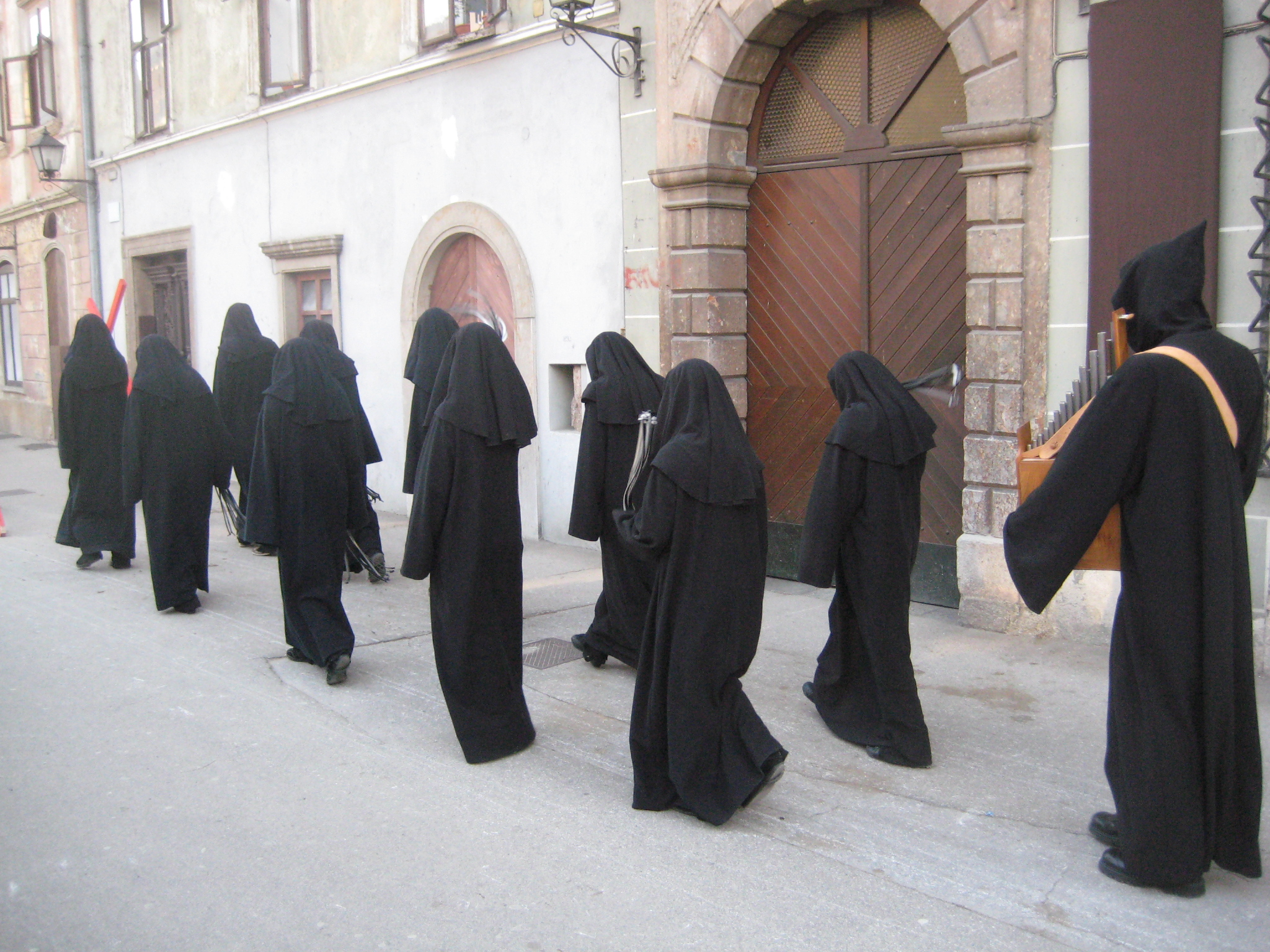 Škofjeloški pasijon (Processio Locopolitana), izvedba 2009 v Škofji Loki